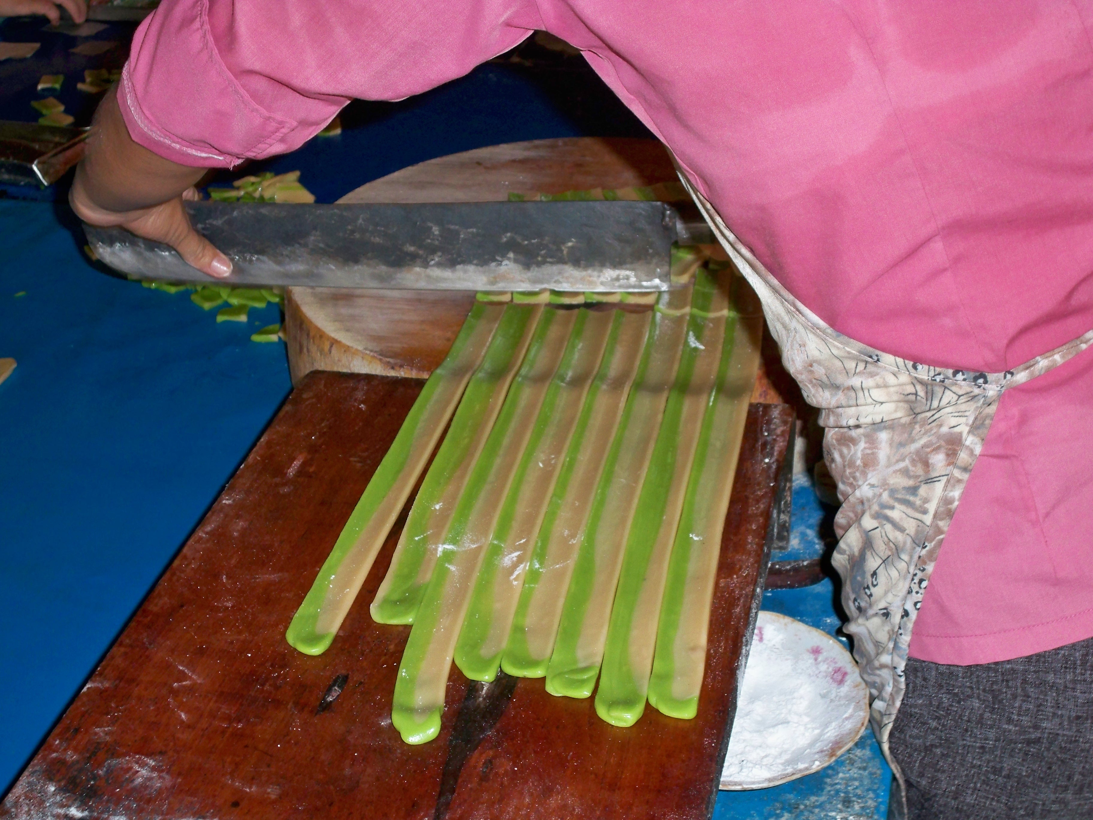 Các công đoạn làm kẹo dừa